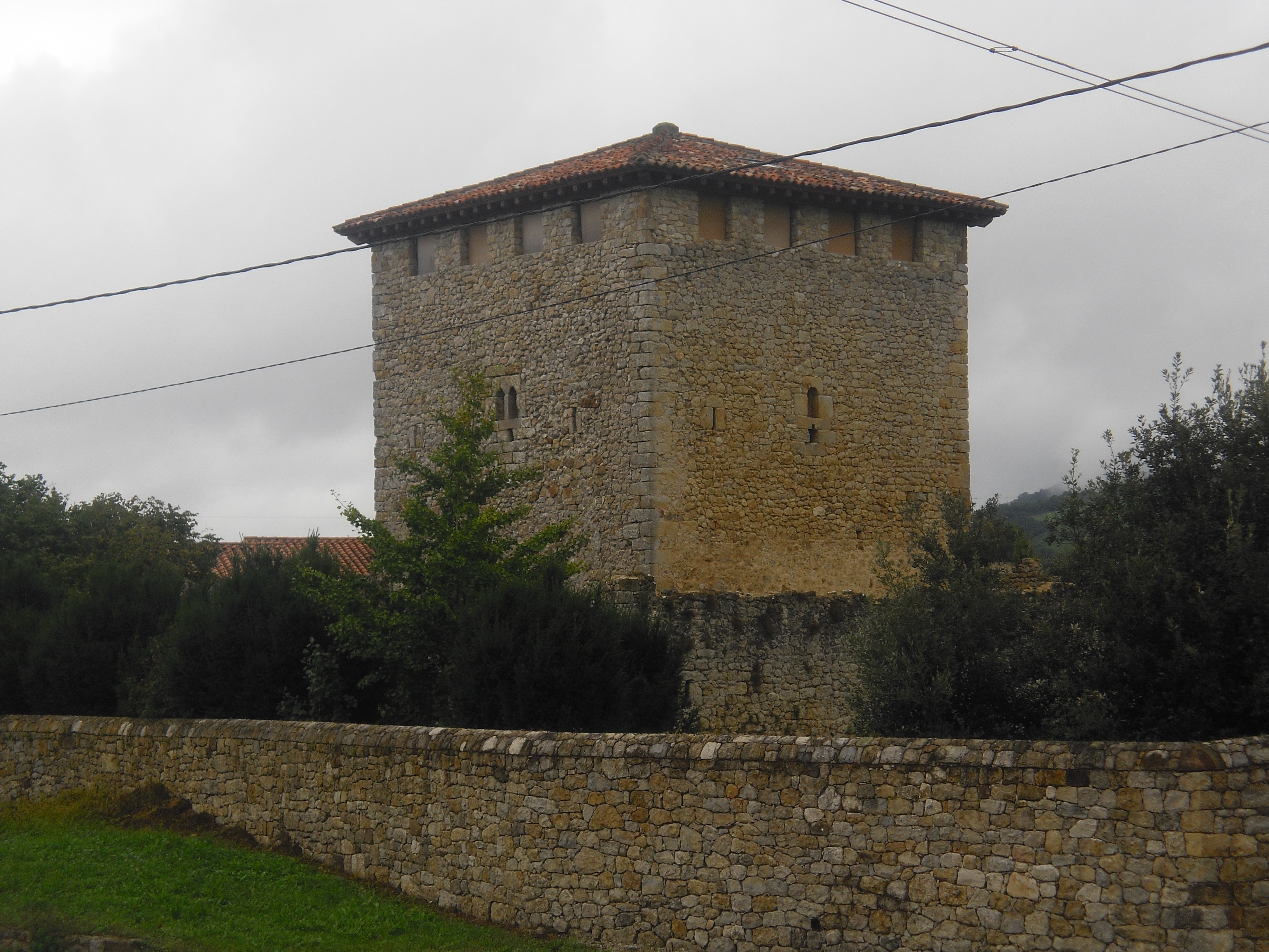 Preciosa torre que se conserva en un estado magnífico.